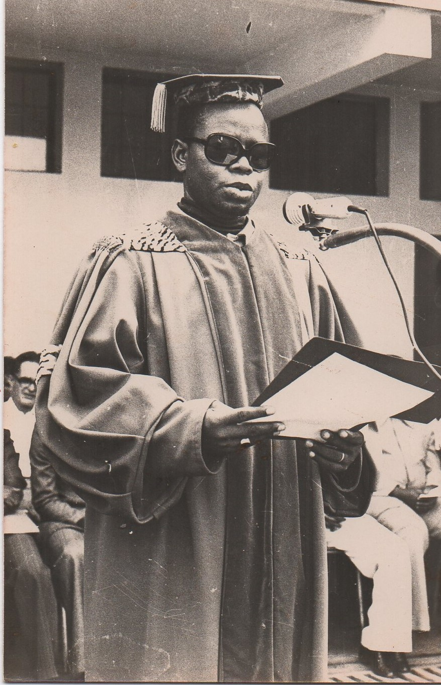 Tshimanga wa Tshibangu